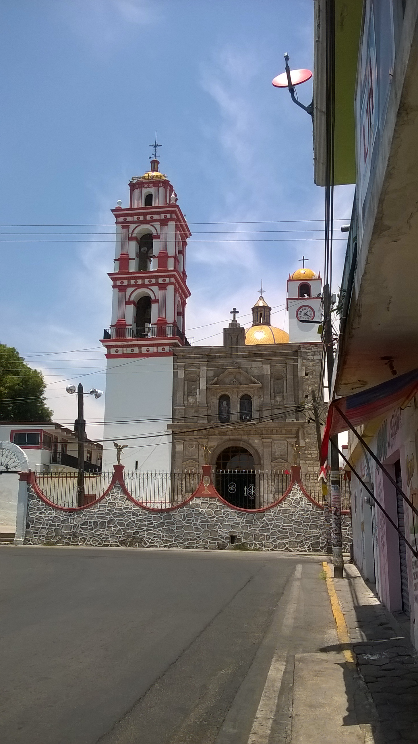 Parroquia de San Damián Texoloc